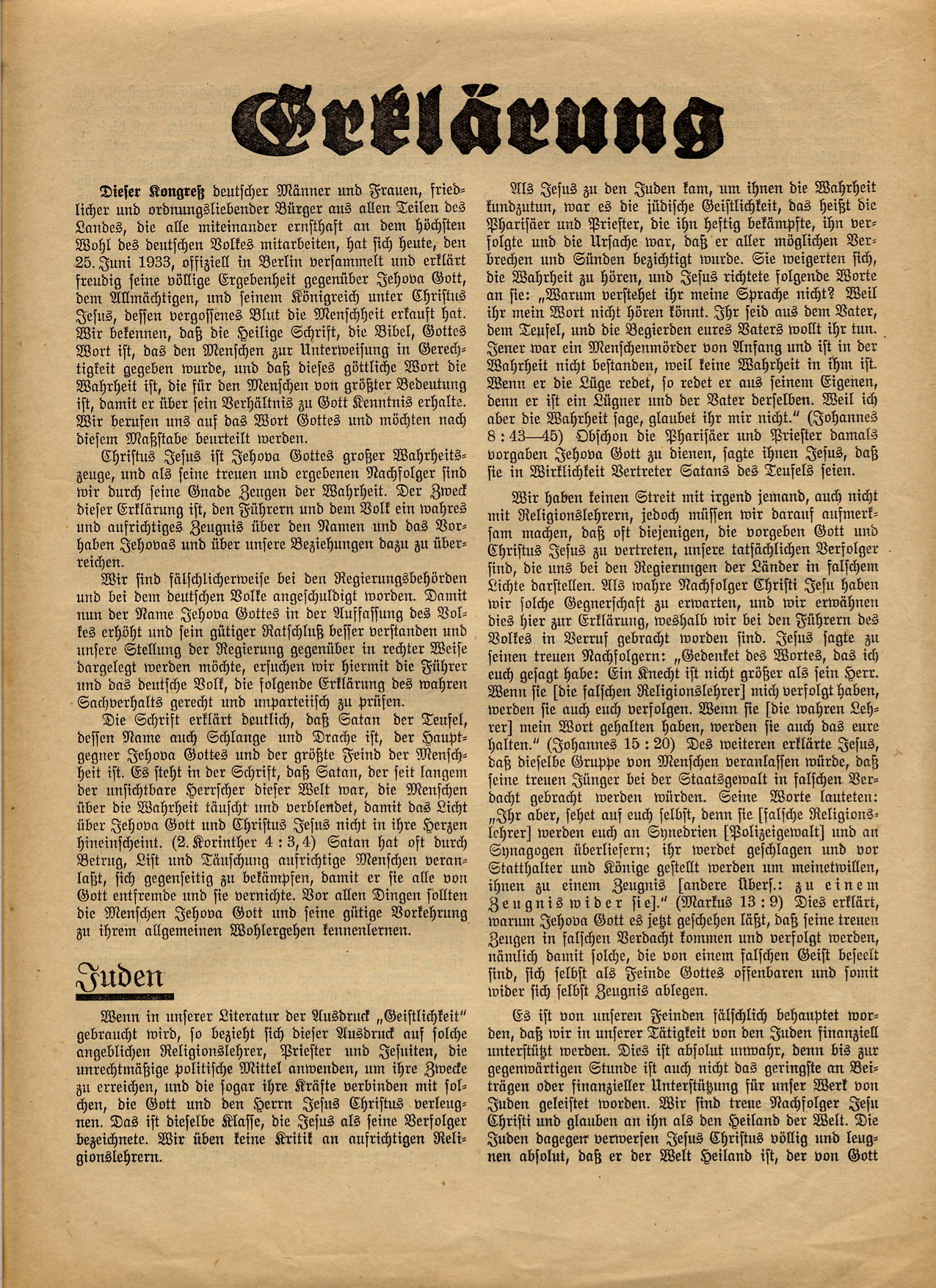 Beschluss von 7.000 Zeugen Jehovas am 25. Juni 1933 in Wilmersdorfer Tennishallen, Berlin, gegen das Verbot der Tätigkeit von Zeugen Jehovas.